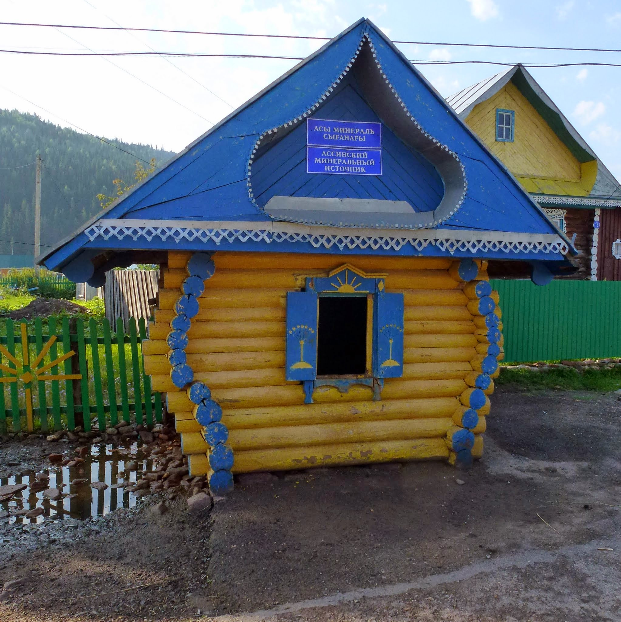 Минеральный источник, Ассы, Башкортостан